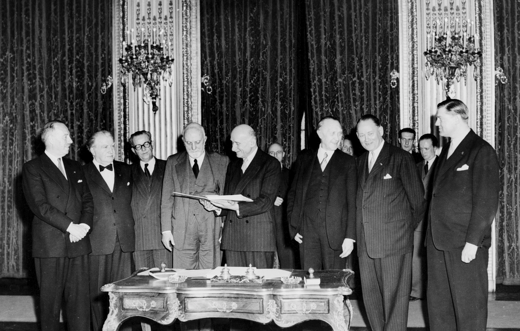 Паризький договір 1951